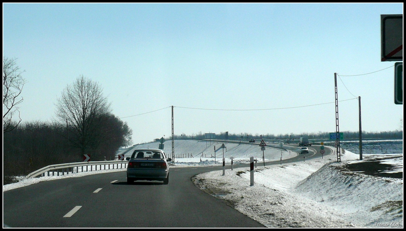 Őr, 4336 Hungary